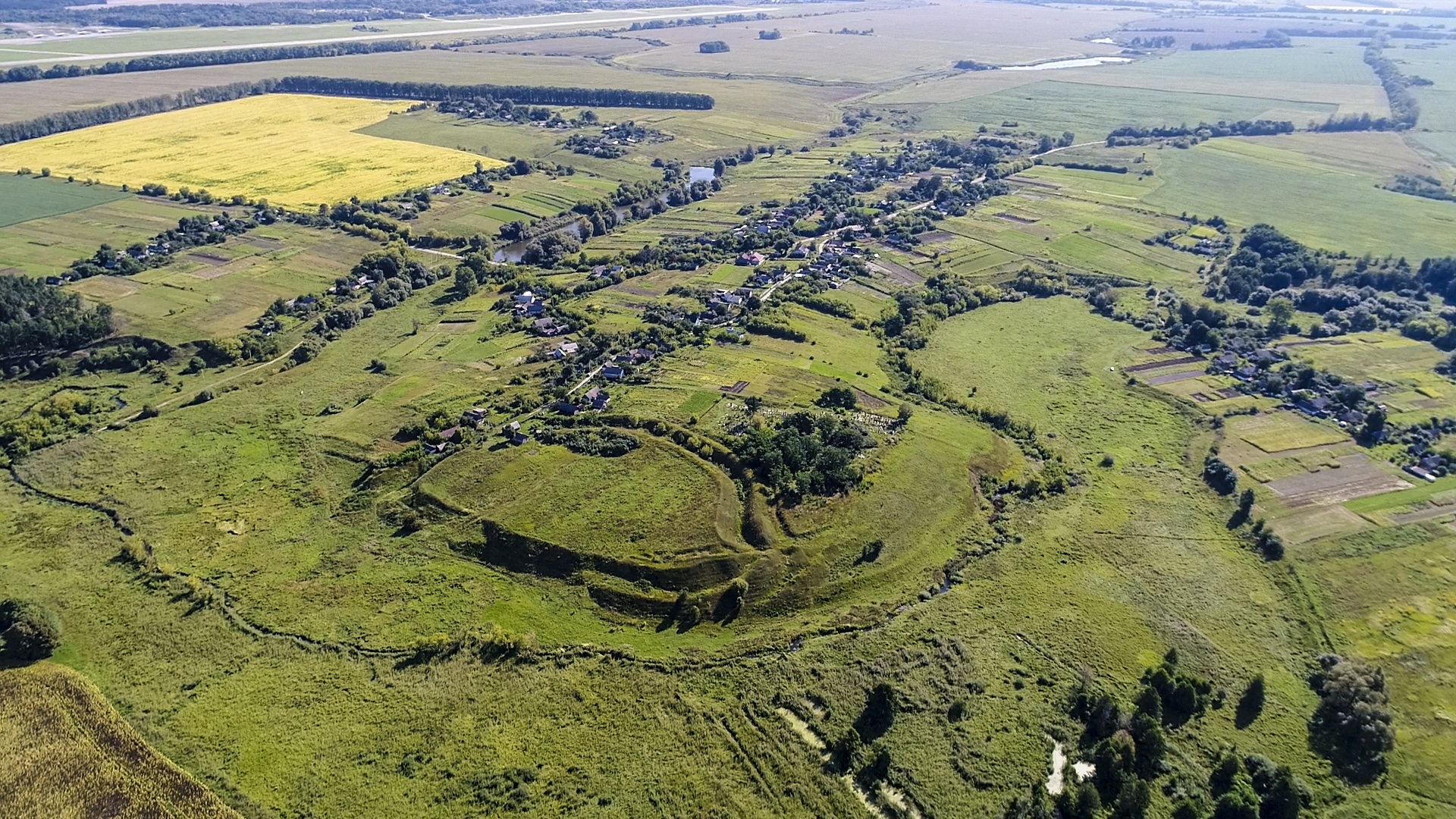 городище, село Городище, південно-західна околиця, правий берег р. Коднянка